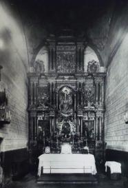 Fotografia del retaule major del Bonsuccès, actualment desaparegut.